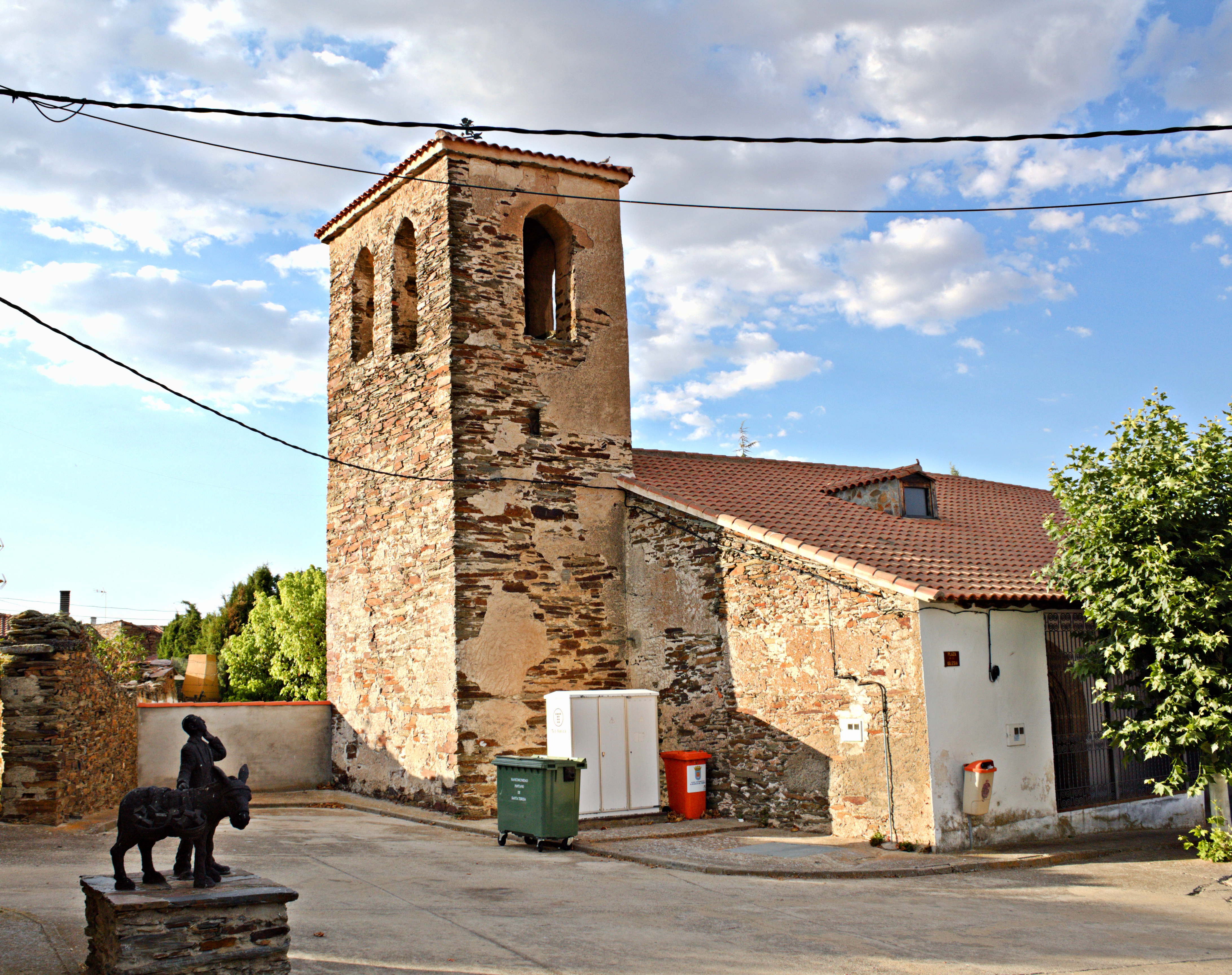 Aldeavieja de Tormes, provincia de Salamanca